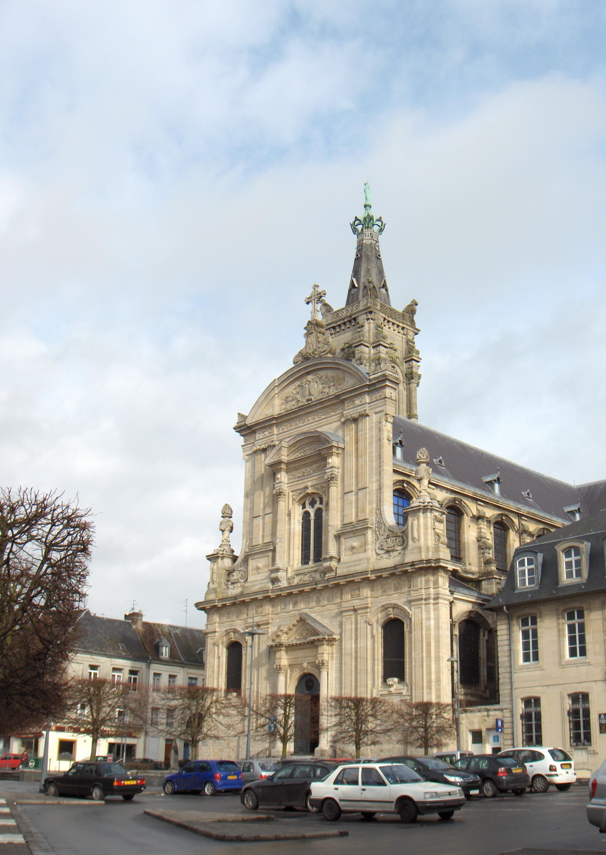 Liebfrauenkathedrale zu Cambrai, Frankreich (Dept. Nord)